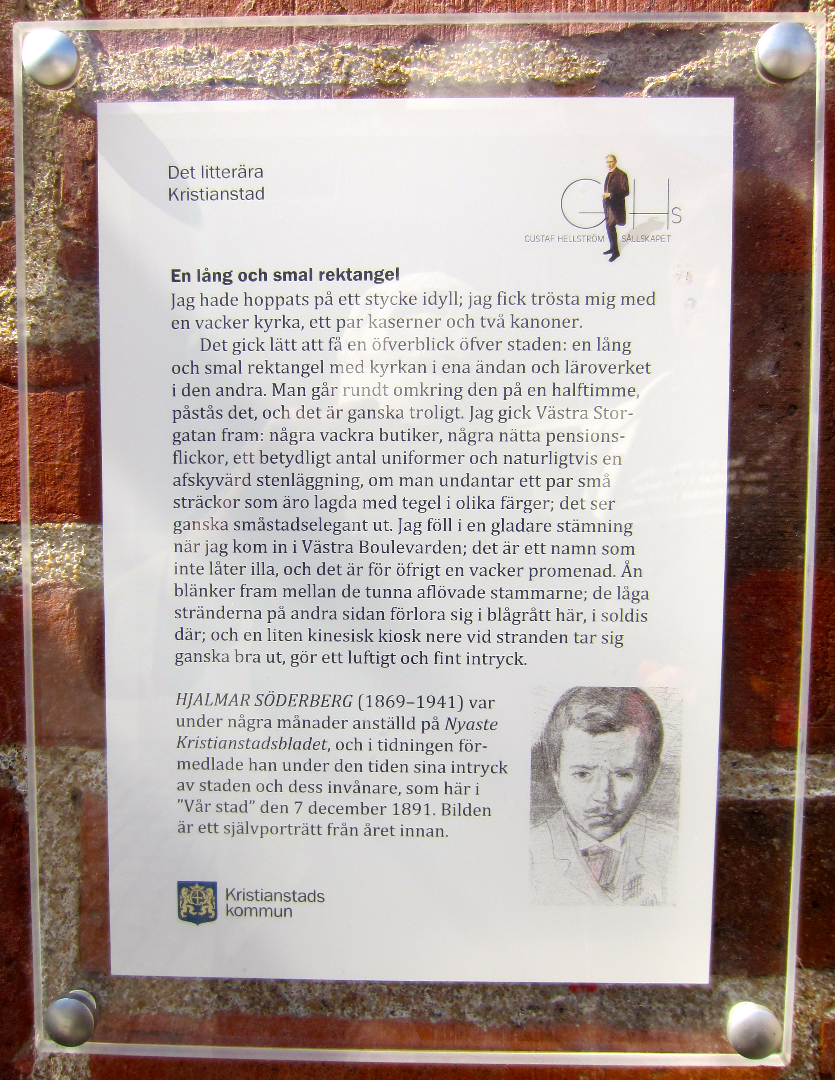 En rektangel i Kristianstad - plakett med information om tiden 1891-92 när Hjalmar Söderberg bodde i staden och arbetade vid Nyaste Kristianstadsbladet.